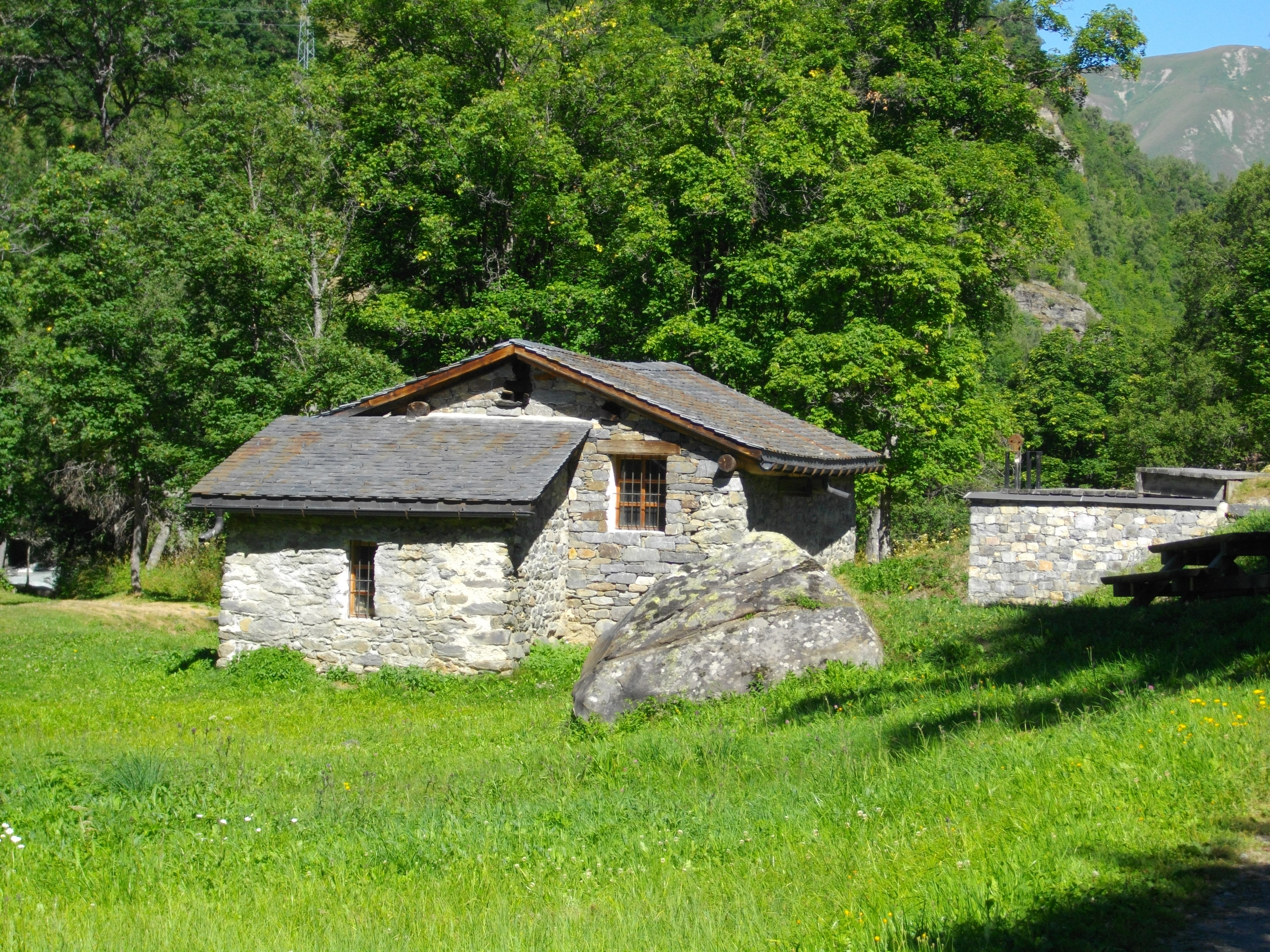 Le moulin de Burdin